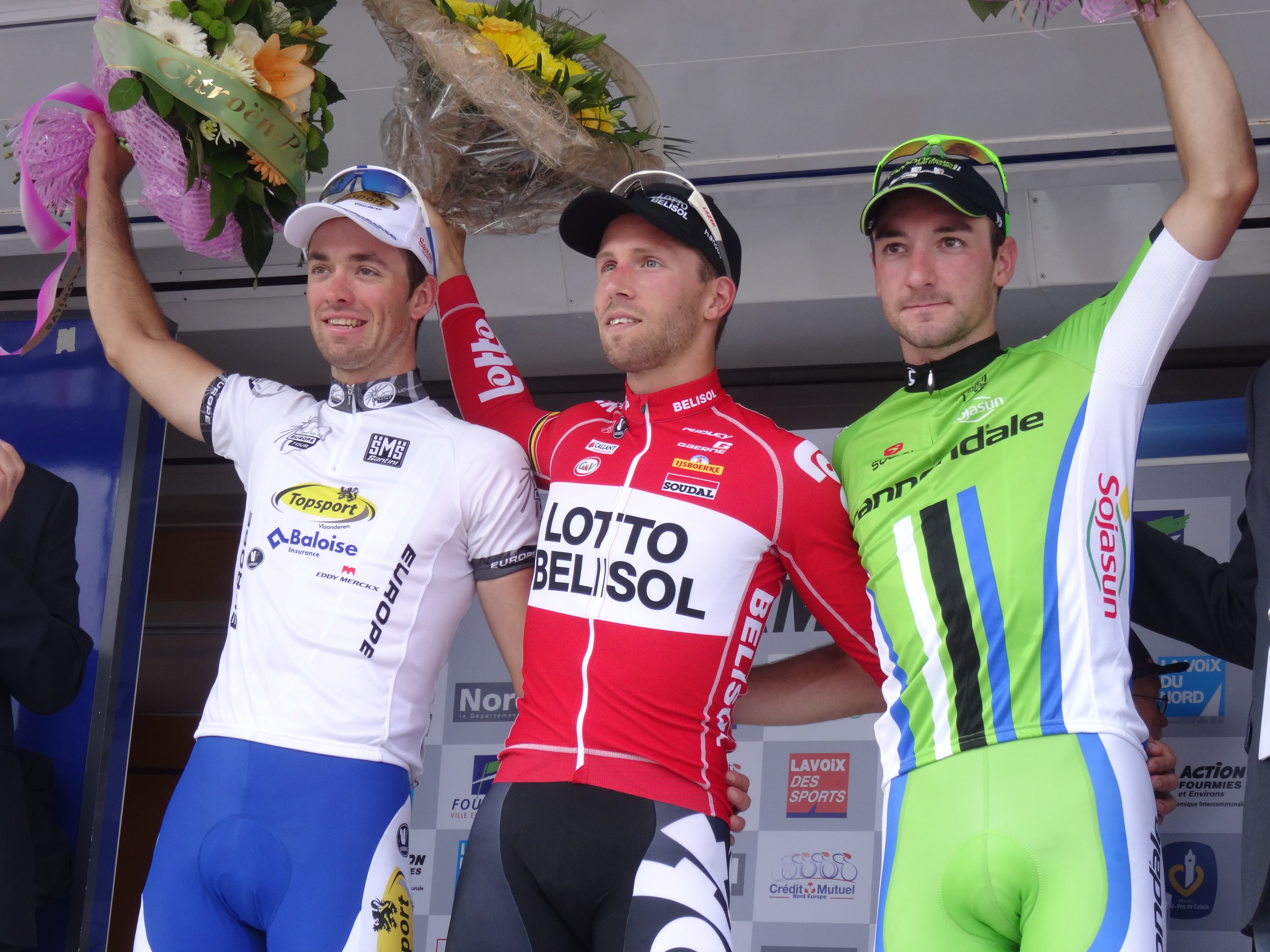 Reportage photographique réalisé le dimanche 7 septembre à l'occasion du départ et de l'arrivée du Grand Prix de Fourmies 2014 à Fourmies, Nord-Pas-de-Calais, France.